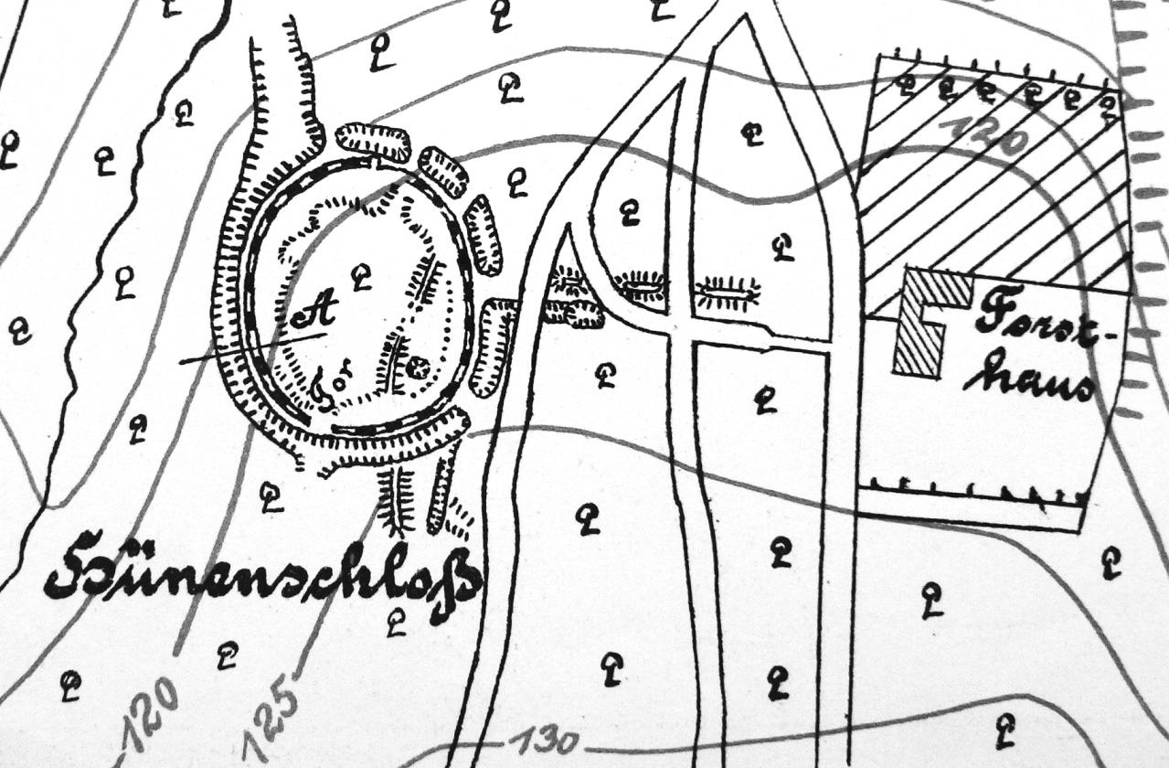 Heisterschlösschen